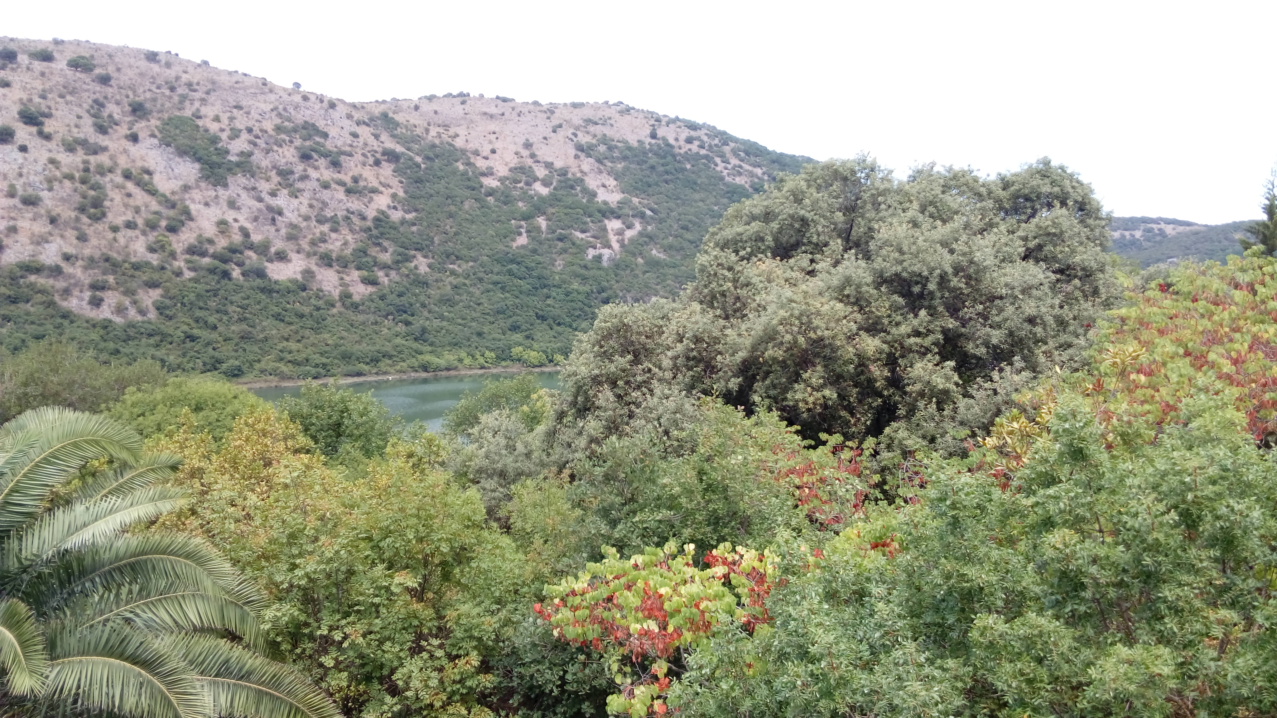 Butrinti, Sarande